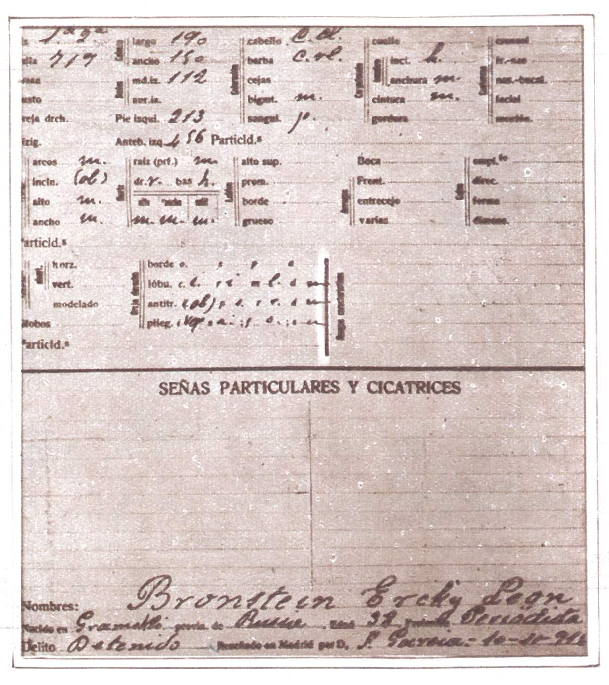 Segunda hoja de la ficha de León Trotsky en la cárcel modelo de Madrid, España.